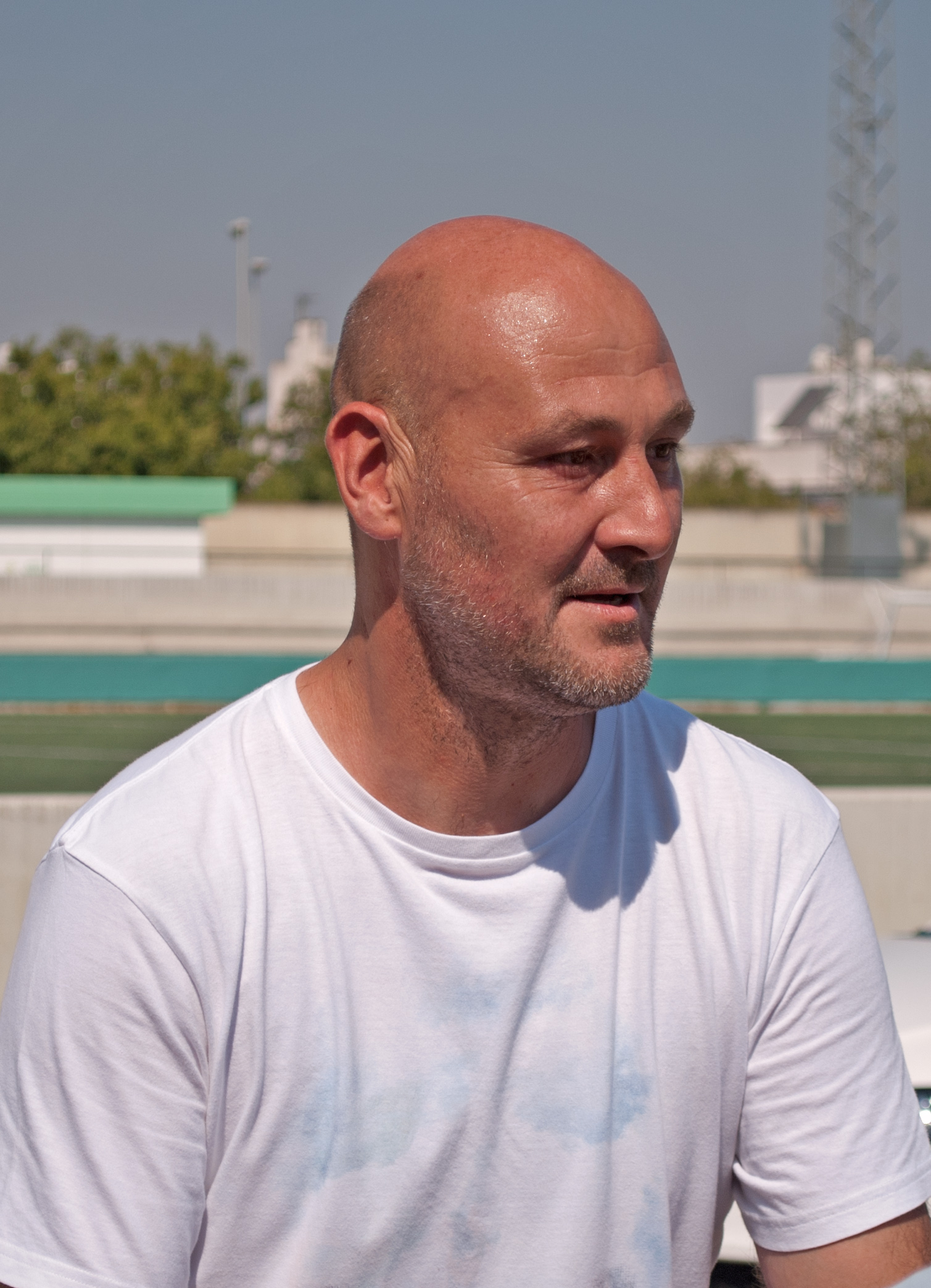 Roberto Ríos, futbolista y entrenador